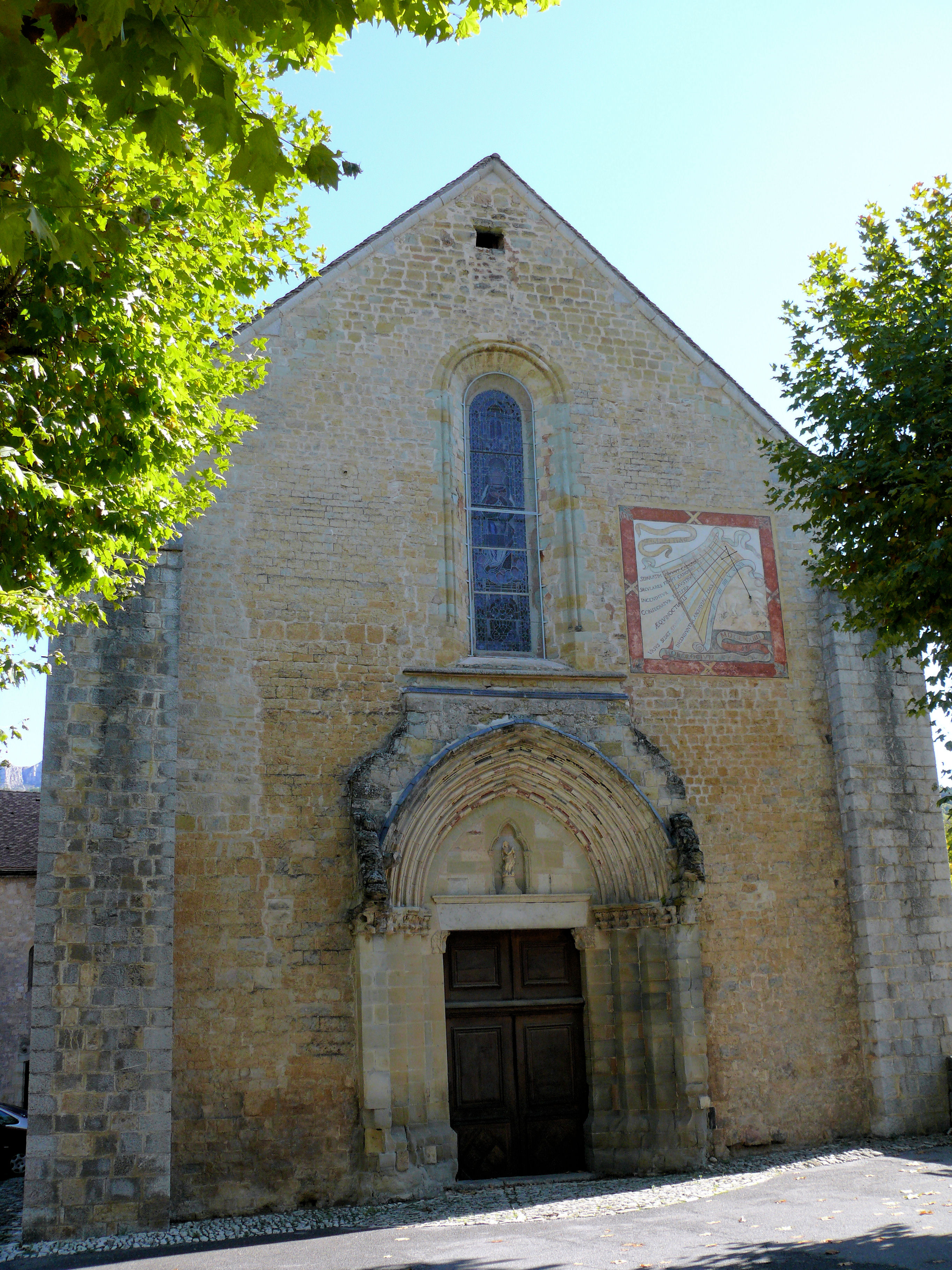 Senez - Cathédrale Notre-Dame-de-l'Assomption - Façade occidentale